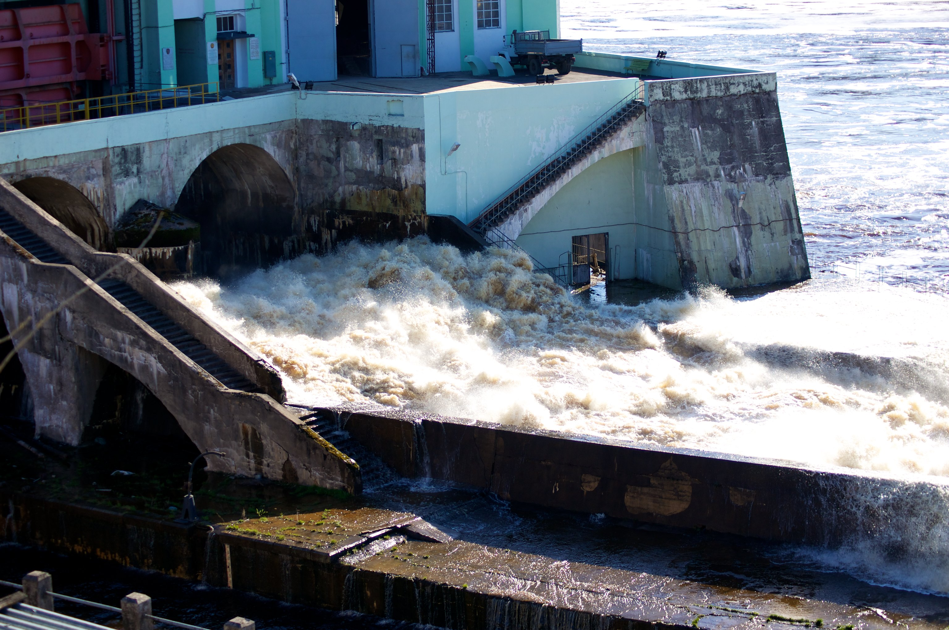 Волховская ГЭС, водоспуск